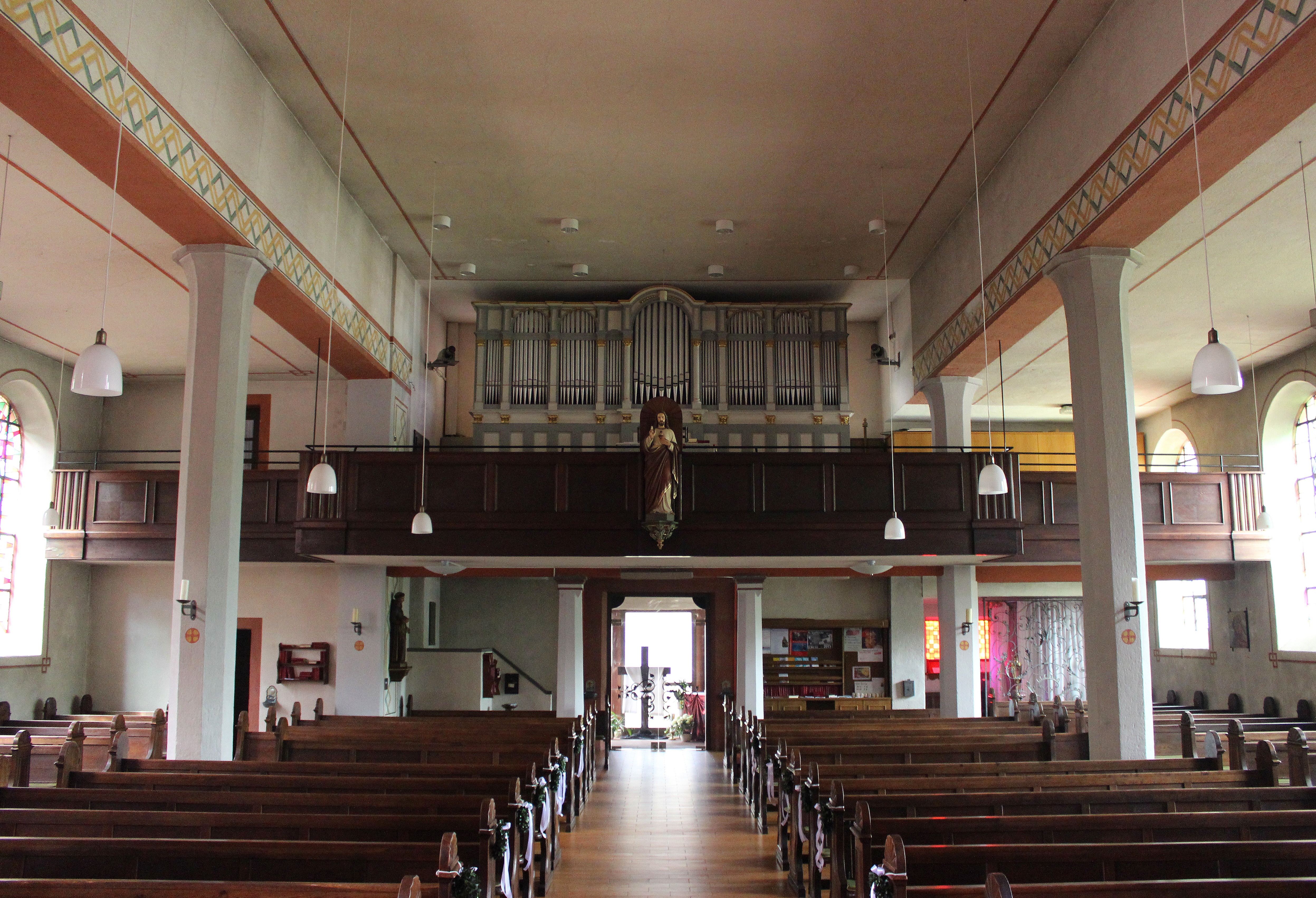 Blick ins Innere der katholischen Pfarrkirche St. Antonius in Saarhölzbach, einem Ortsteil der Gemeinde Mettlach, Landkreis Merzig-Wadern, Saarland